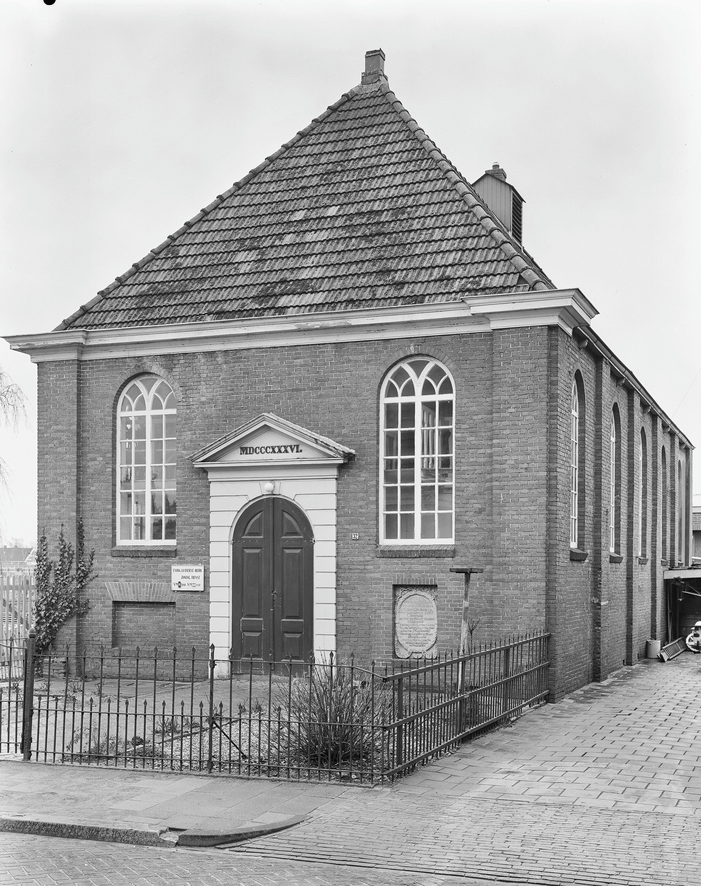 Lutherse kerk: Overzicht vanaf de weg